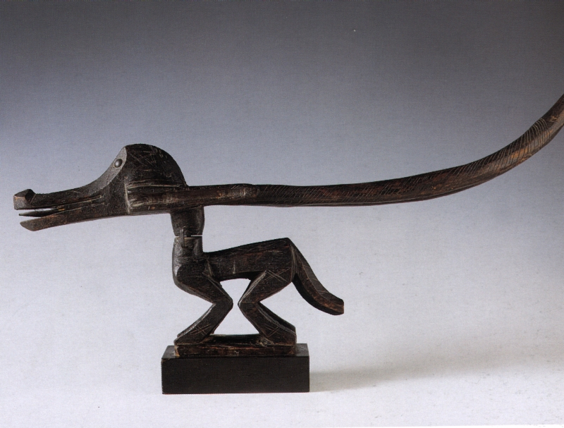 MASCHERA CIMIERO CIWARAKUN - La scultura lignea era completata in loco da una calottina da legare alla testa del danzatore e al suo costume. La scultura zoomorfa ha sviluppo orizzontale con muso, orecchie e corna rivolte all'in su, fortemente allungati. La bocca aperta mostra la lingua, gli occhi sono resi con due borchie metalliche. Le zampe sono a clessidra e il busto rialzato all'indietro con coda rivolta verso il basso. La scultura è costituita da due parti modellate separatamente e assemblate con una giuntura di ferro all'altezza del collo. Le maschere della società ciwara presiedevano ai culti dei campi incoraggiando i contadini nel lavoro e mettendoli in competizione fra loro. Ciwara celebra il sole e i suoi effetti benefici sulla terra. La zappa del contadino così come il sole feconda la terra e la rende produttiva. Diversamente da altre società iniziatiche bamana, quella ciwara consente una certa partecipazione anche alle donne. Se a portare le maschere di questa società maschile sono sempre uomini, le donne possono però partecipare a una parte dei riti e mangiare la carne dei sacrifici (Colleyn 1998). Le maschere danzano in coppie formate da un'antilope mashio e da una femmina. Talora però, in certe zone, la figura rappresentata costituisce un assemblaggio di diversi animali: antilope, pangolino, oritteropo, faraona.